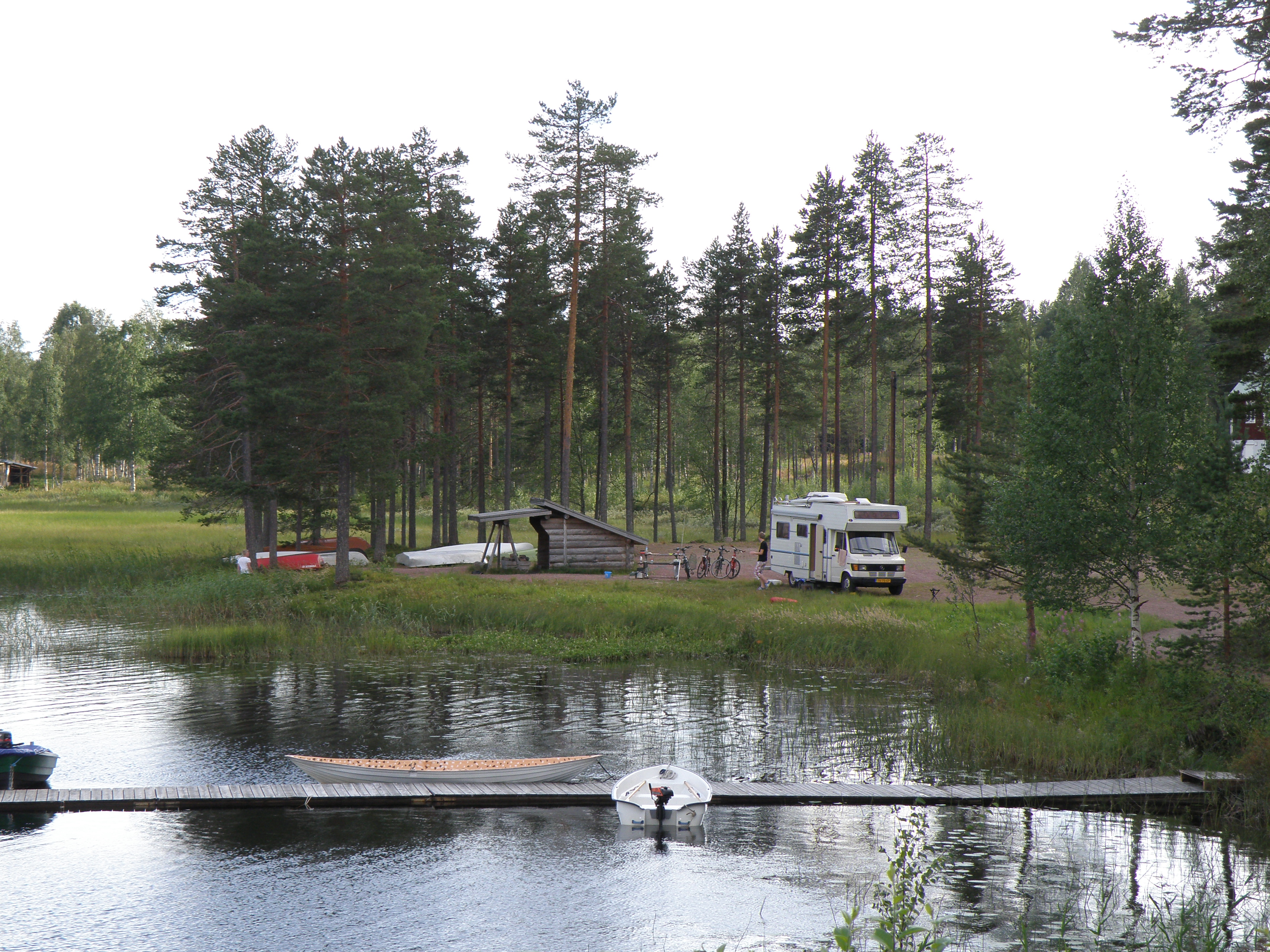 Nornäs Camping, Nornäs, Älvdalens Kommun, Sverige